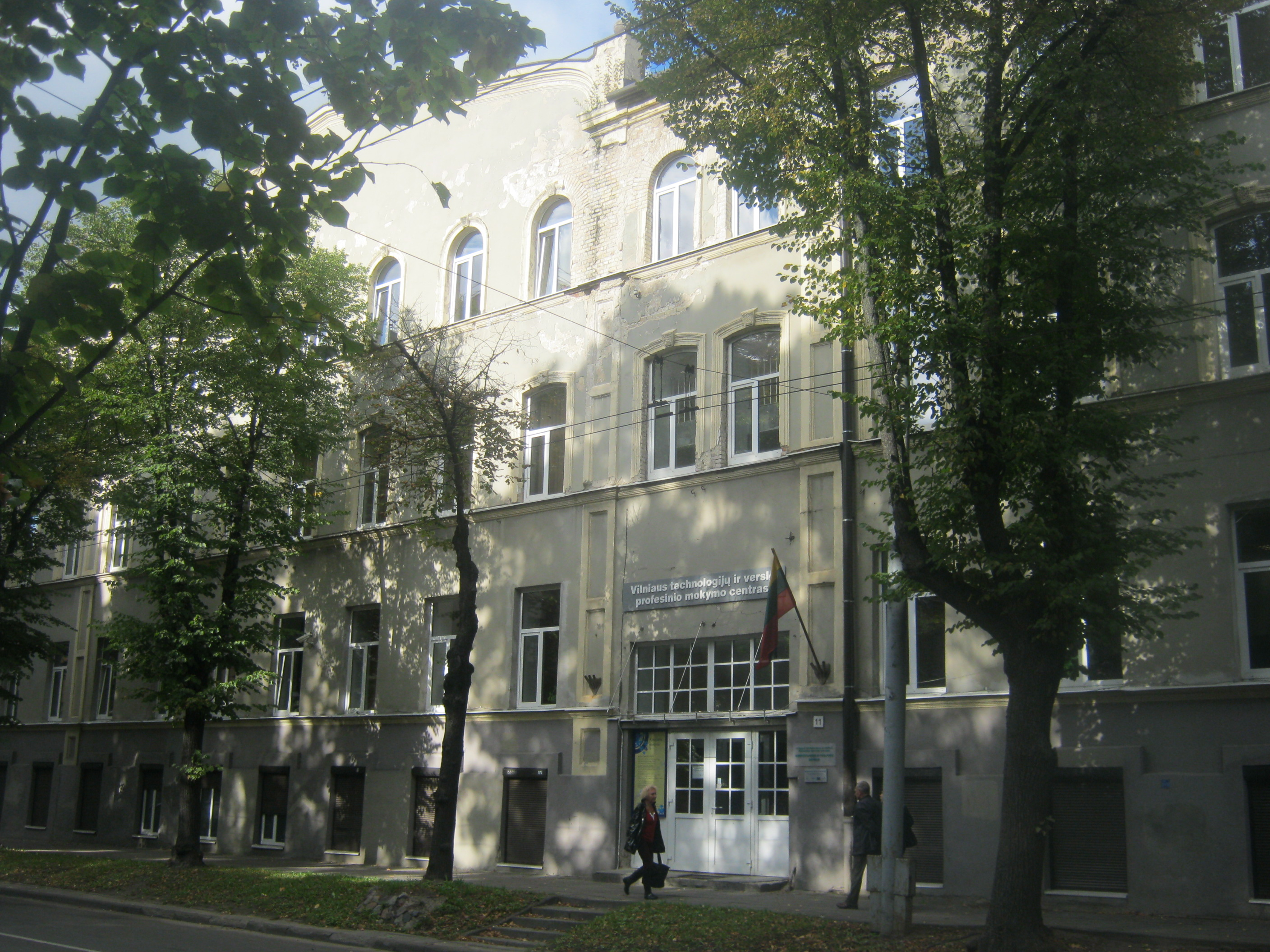 Vilniaus technologijų ir verslo mokymo centras